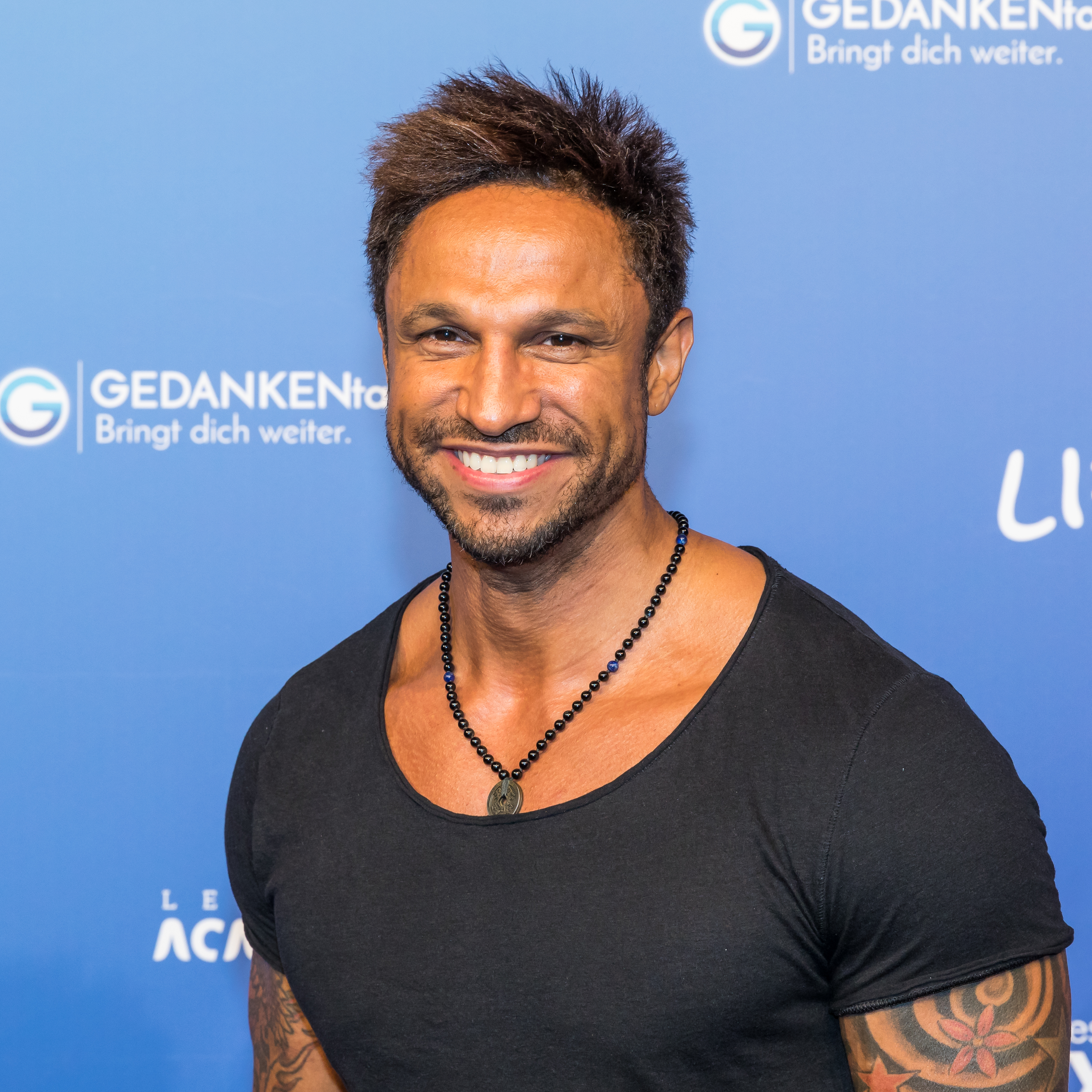 GedankenTanken Köln 2018 - 02 - Roter Teppich, der in blauer Farbe ausgeführt ist.Foto: Daniel Aminati, Sänger, Tänzer, Moderator